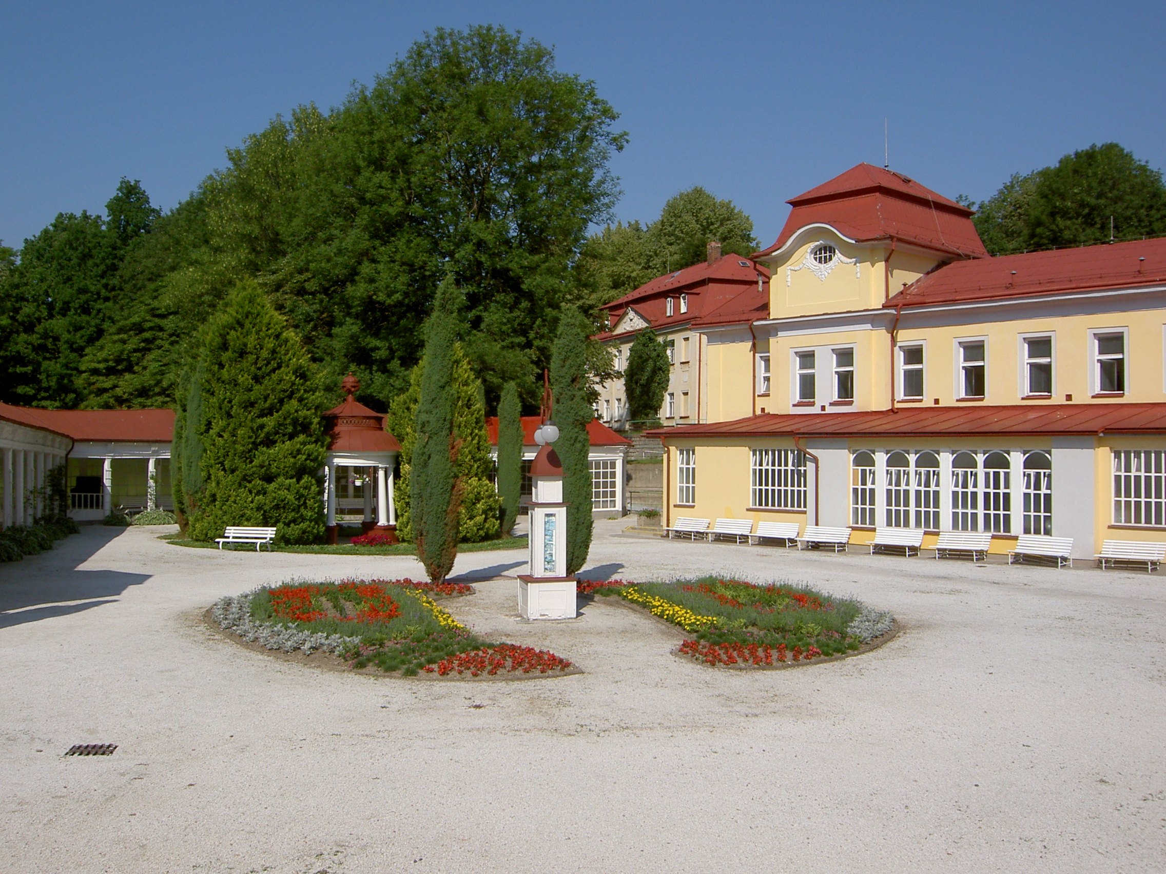 Spa Lázně Libverda in Jizera Mountains, Czech Republic